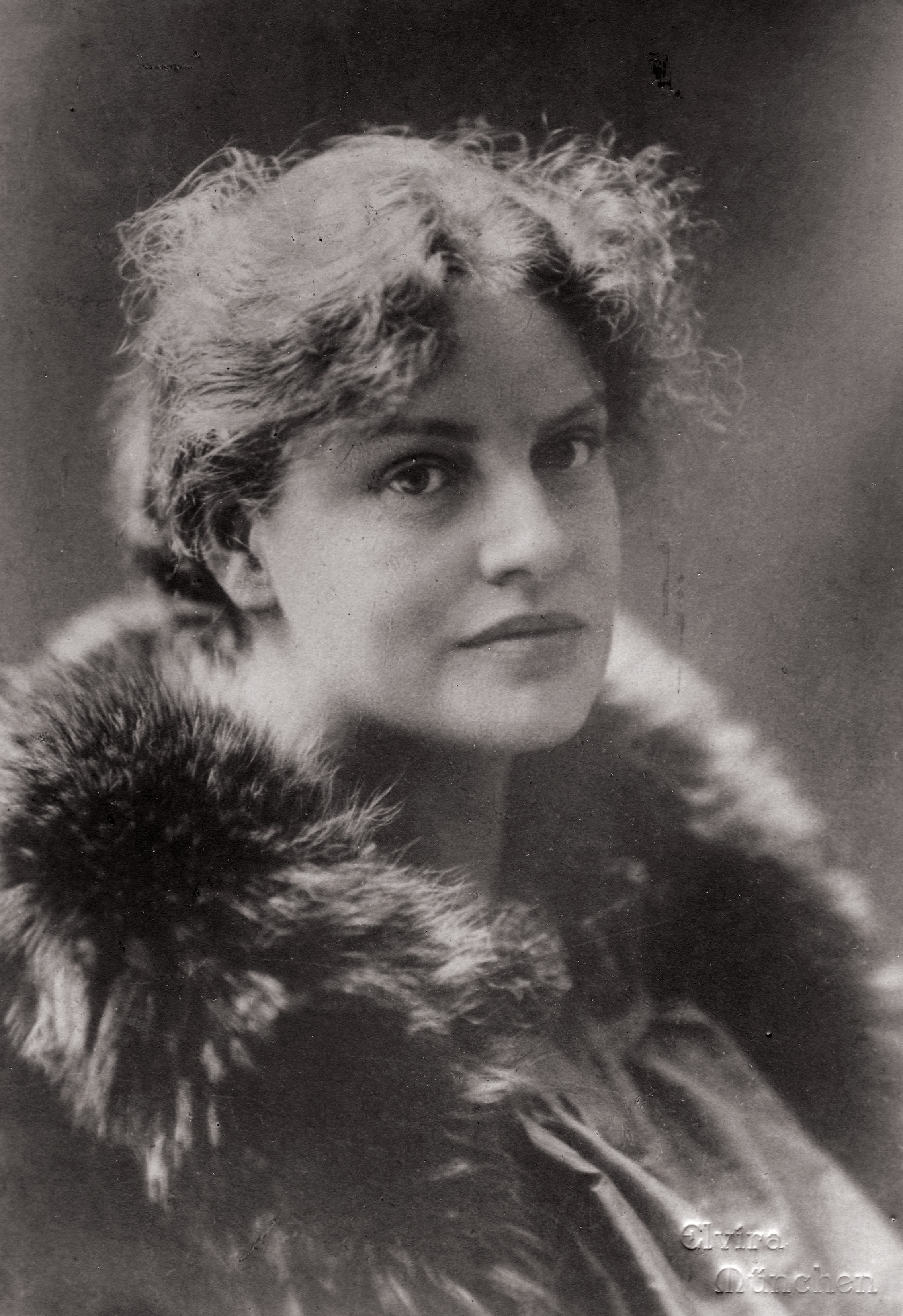 Lou Andreas-Salomé, c. 1897. Mit Blindstempel des Atelier Elvira, München